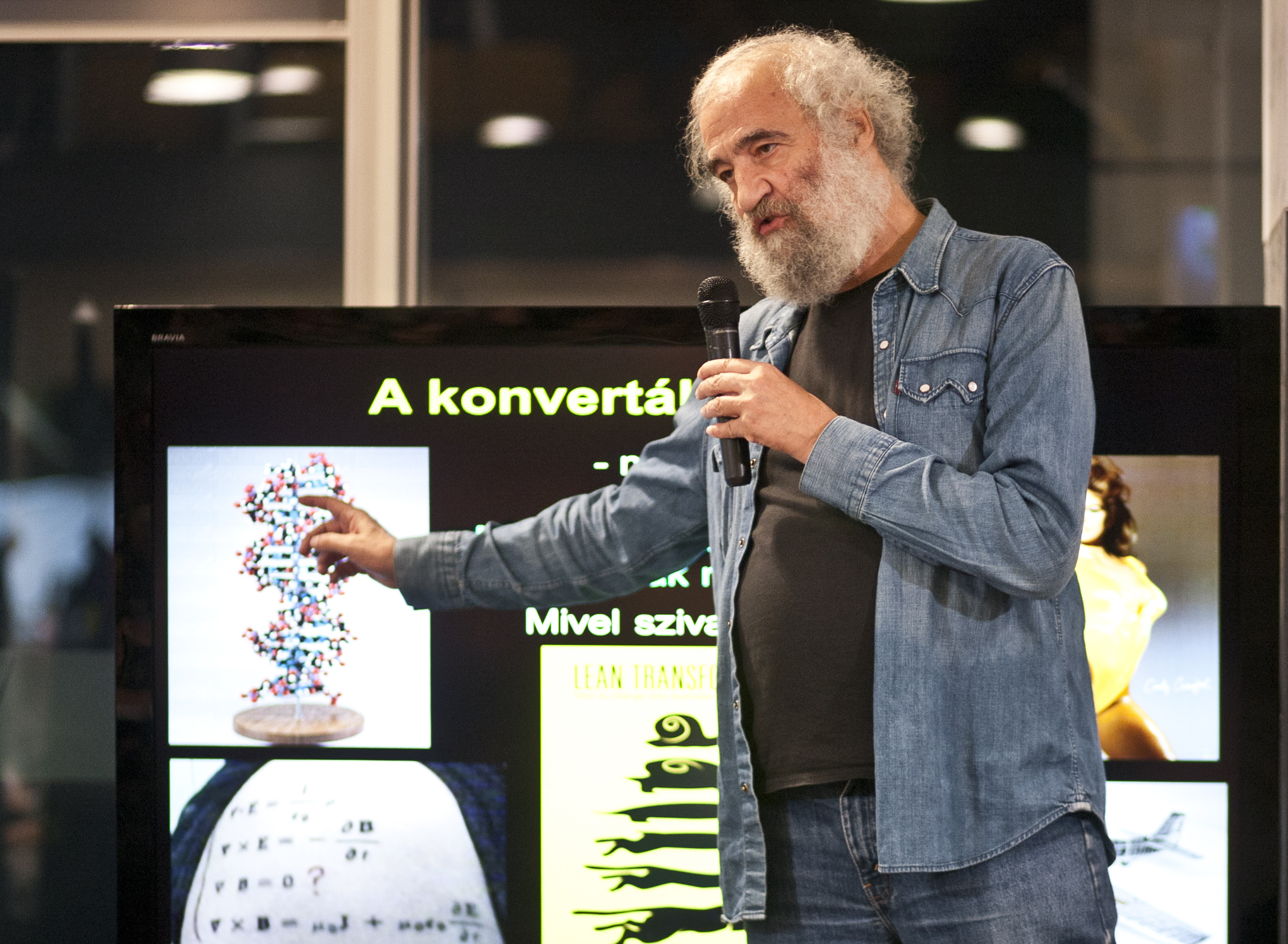 Kutatók éjszkája az Európapontban. Mérő László matematikus pszichológus Átlagisztán- Extremisztán c. előadásán. Fotó: Európai Bizottság/Dudás Szabolcs 2015.09.25.